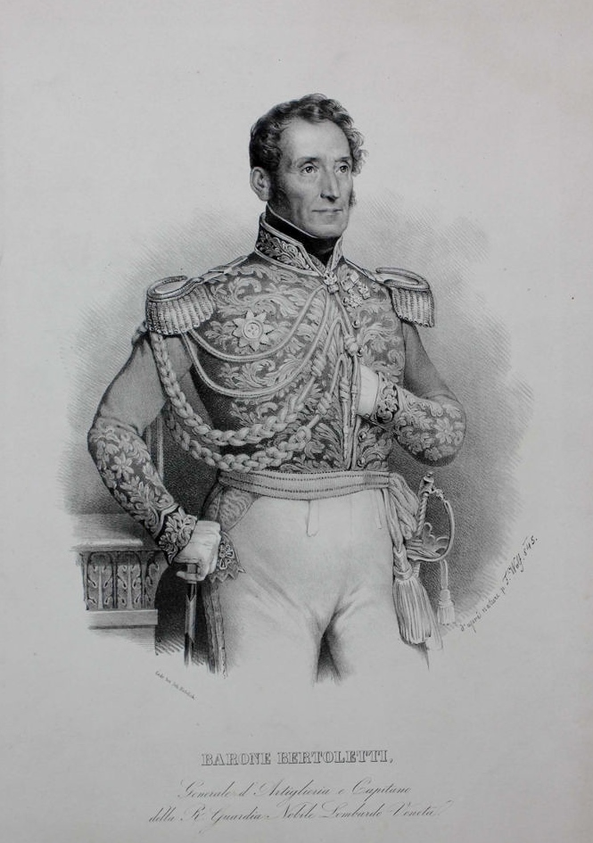 Antoine Marc Augustin Bertoletti (1775-1846), général italien au service de la France puis de l'Empire d'Autriche. En 1813, il défend avec succès la ville de Tarragone contre les Anglo-Espagnols.